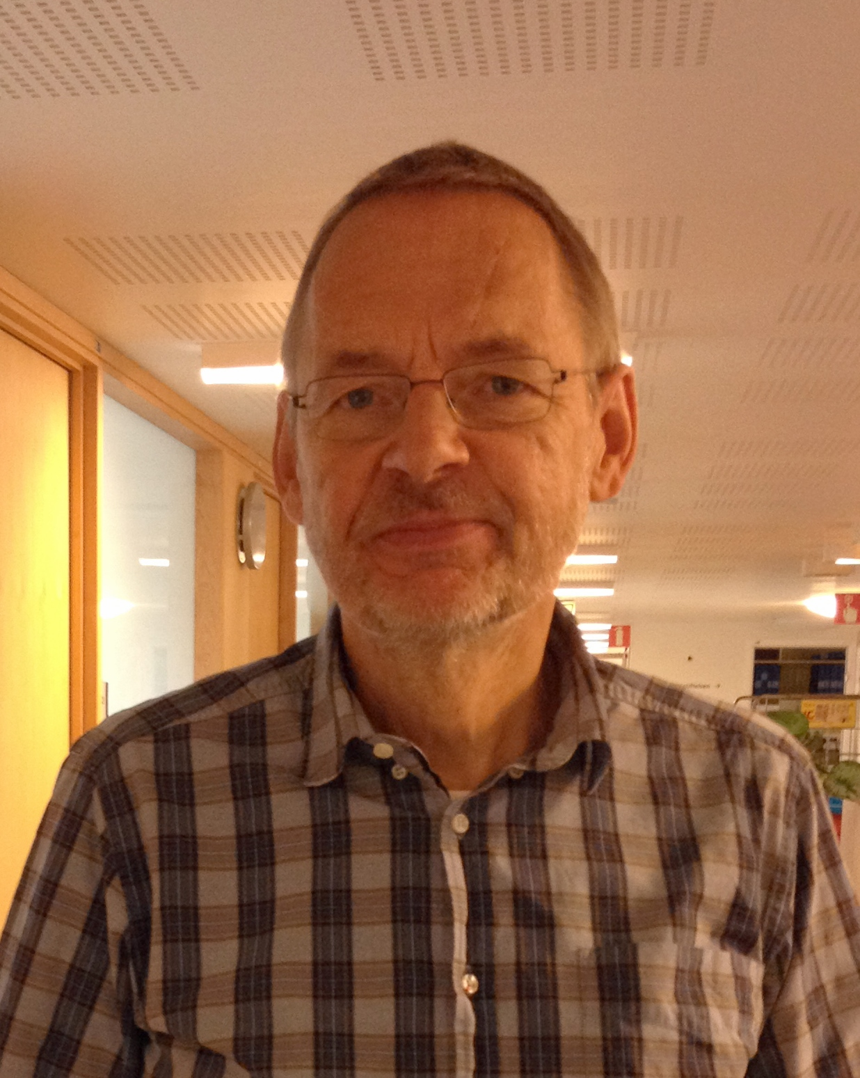 Kjell Östberg, professor vid Samtidshistoriska institutet, Södertörns högskola